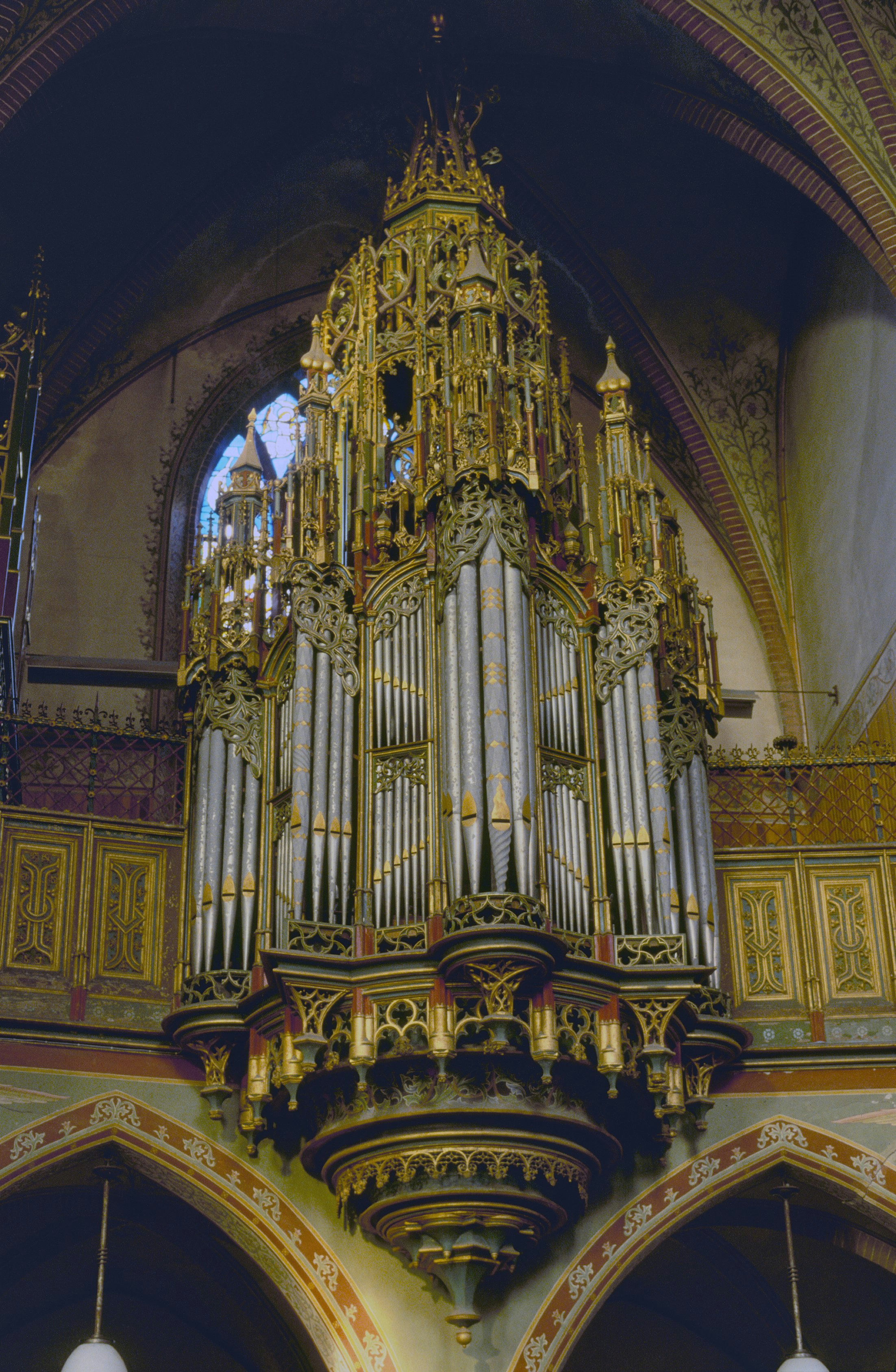 Rooms-Katholieke Sint Nicolaaskerk: INT. orgel